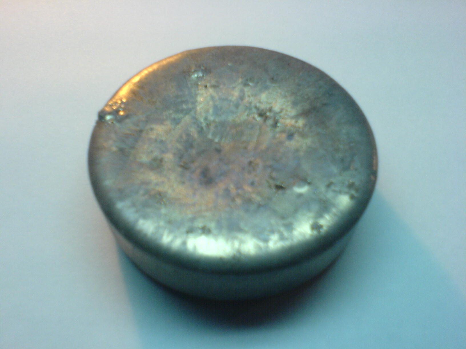 Слиток металлического свинца(99,999%)